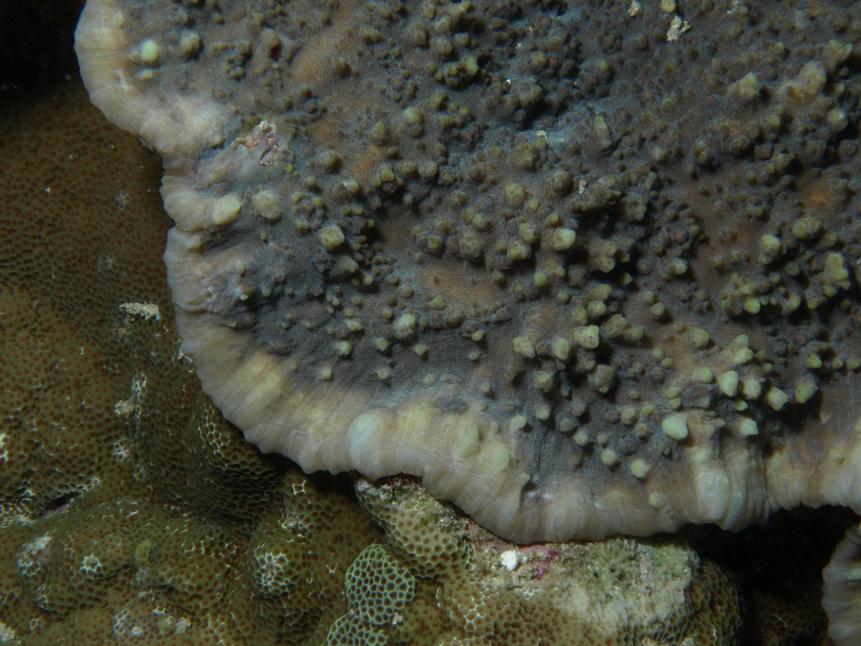 Echinophyllia aspera, en la isla Mer, Estrecho deTorres, Australia